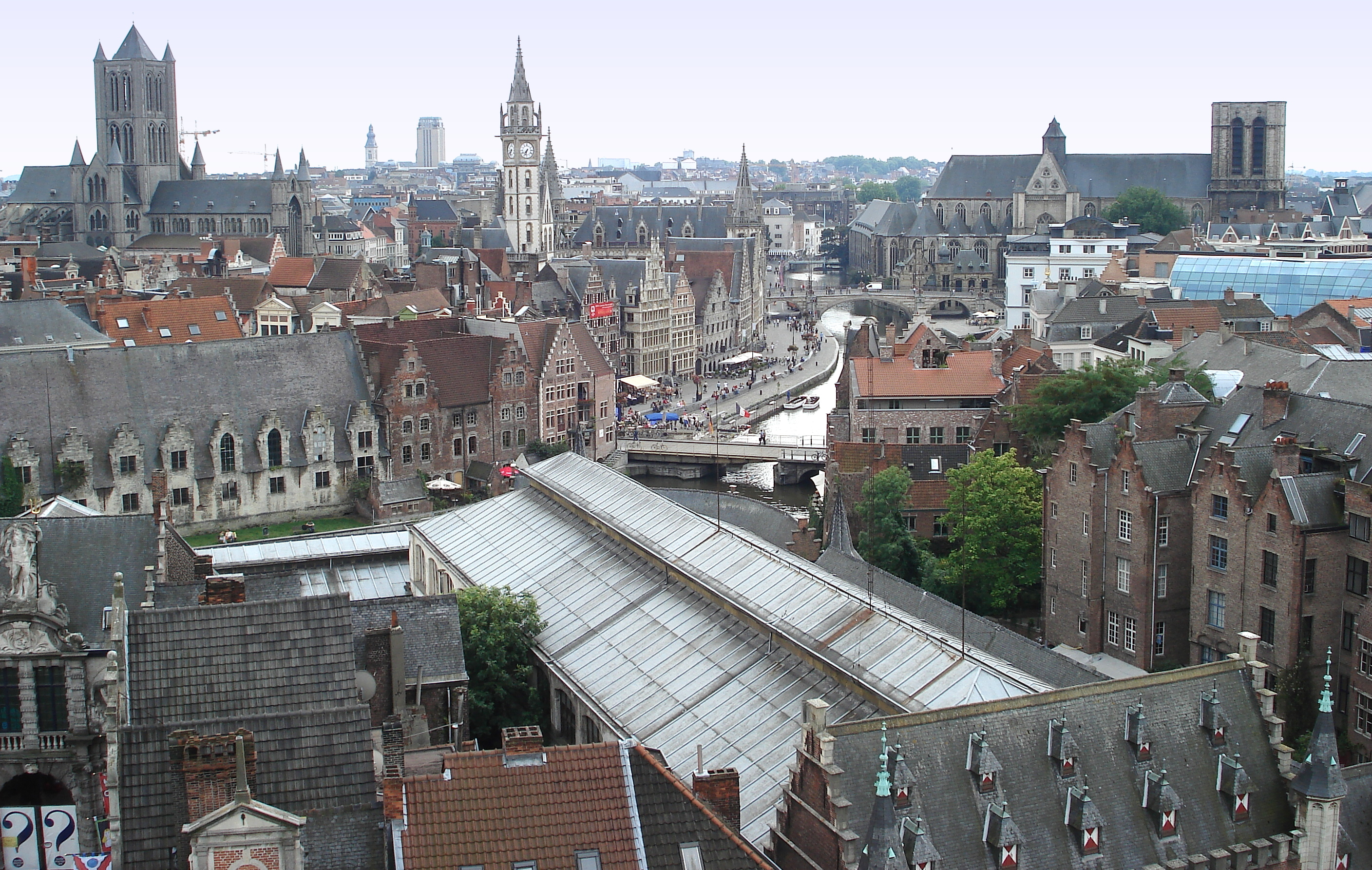 Vue du vieux Gand (Belgique) prise du haut du donjon du Château des Comtes (Gravensteen). De gauche à droite, en haut: l’église Saint-Nicolas; tout au loin, à l'horizon: l’église Saint-Pierre et la bibliothèque universitaire; la tour à horloge de l’hôtel de poste, dont fait partie aussi l’aile néogothique à droite de la tour; entre celle-ci et la bibliothèque universitaire, on distingue le toit arrondi de l’Institut des Sciences; l’église Saint-Michel et son clocher carré et trapu. Au deuxième plan: le Vleeshuis; le Graslei et son alignement de façades, dont celle du Spijker (derrière les parasols blancs). La grande toiture de zinc à l’avant-plan appartient au Vismijn. On remarque la rivière la Lys serpentant à travers la vieille ville. Le bâtiment situé sur la Lys derrière le chevet de l’église Saint-Michel, et que l’on voit de biais, est le couvent des dominicains (le Pand).